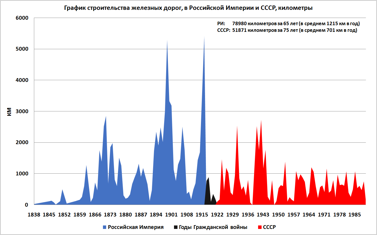 График строительства железных дорог, в Российской Империи и СССР, километры. Годы Гражданской войны указаны отдельно. Версты (единица длины в РИ) пересчитаны в километры.